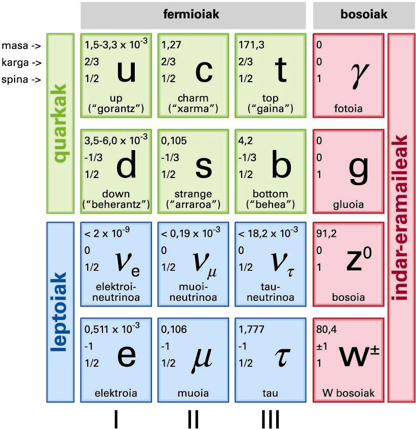 Oinarrizko partikulen eredu estandarra. Lehen hiru zutabeetan, fermioiak daude, familiatan antolatuta. Eskuineko zutabean, gauge bosoiak. Irudian ez da ageri eredu estandarrak aurreikusten duen Higgs bosoia (2012ko uztailean aurkitua). Karga elektrikoak protoiaren karga unitatetzat harturik daude adierazita; spinak, h/2π unitatetan. Masak GeV/c2 unitatetan adierazita daude; partikulen masen iturria: C. Amsler et al. (Particle Data Group), PL B667, 1 (2008) and 2009 partial update for the 2010 edition (URL